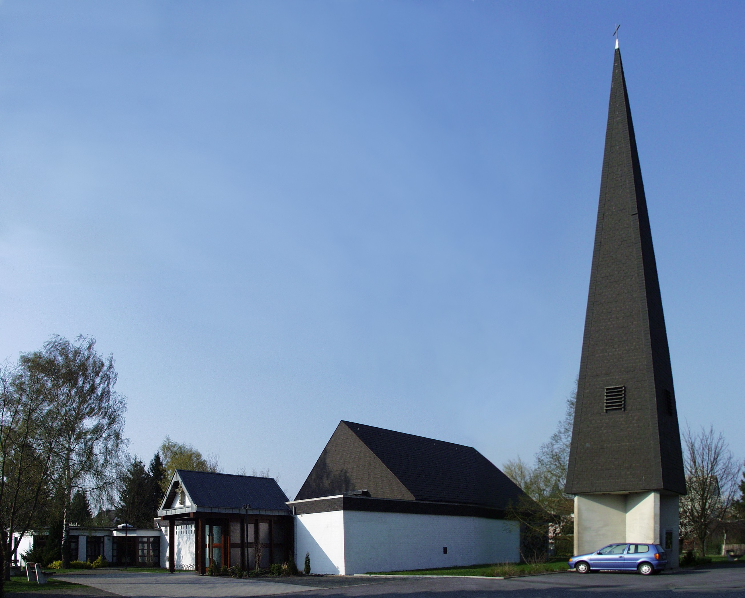 Erlöserkirche Paderborn-Elsen Ansicht Südwest 2002